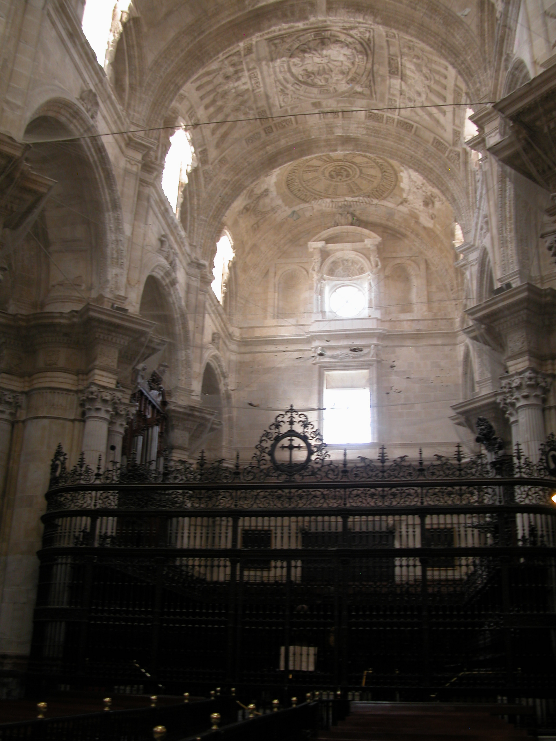 Vista interior hacia la Portada de la Catedral de Cádiz